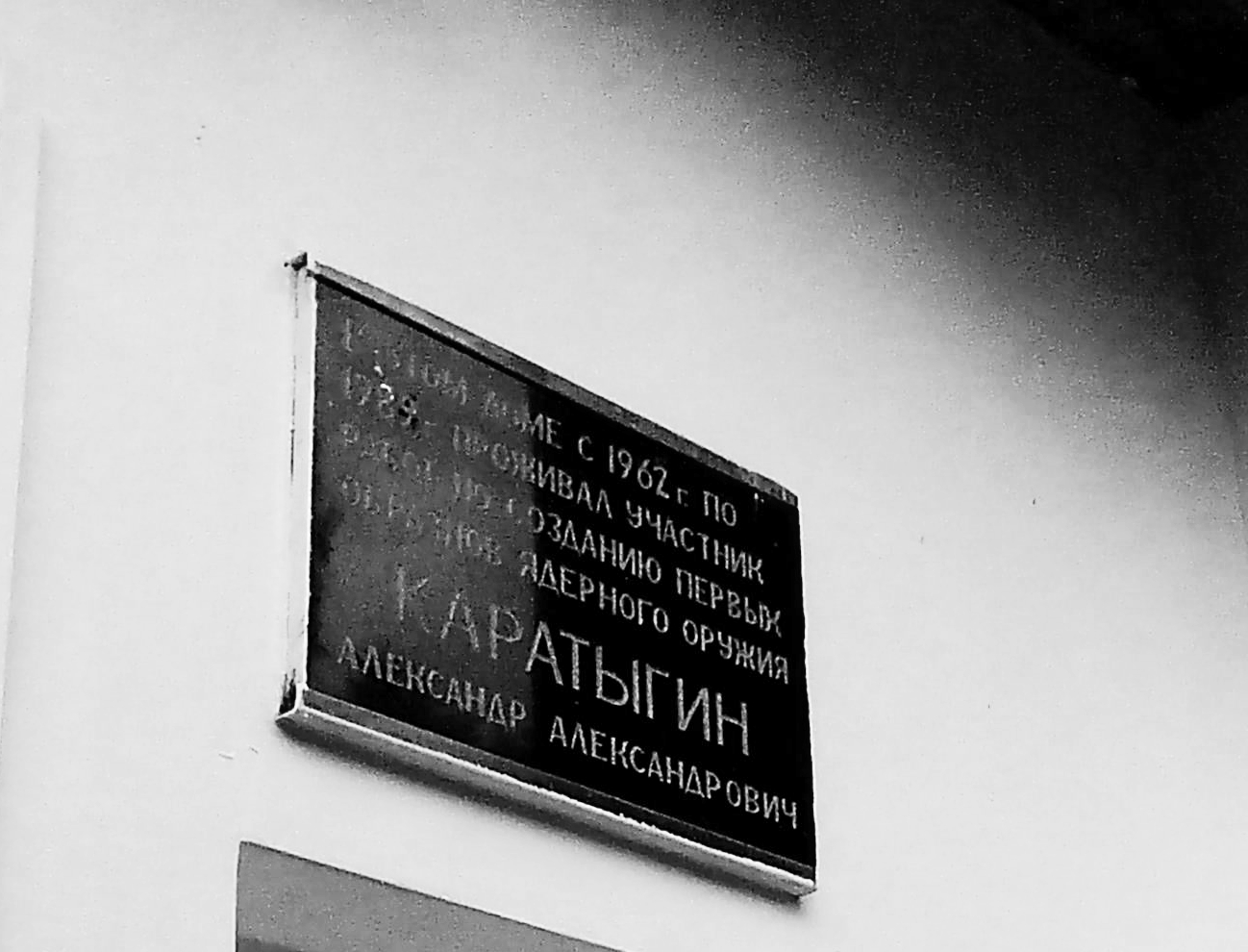 Мемориальная доска на доме в Обнинске, где жил Александр Александрович Каратыгин